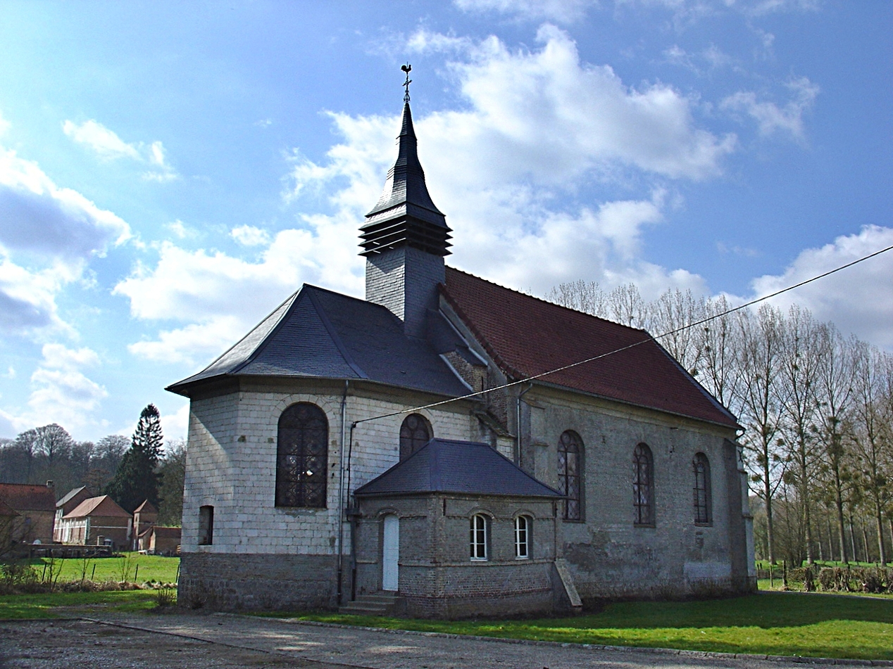 Église de Wail